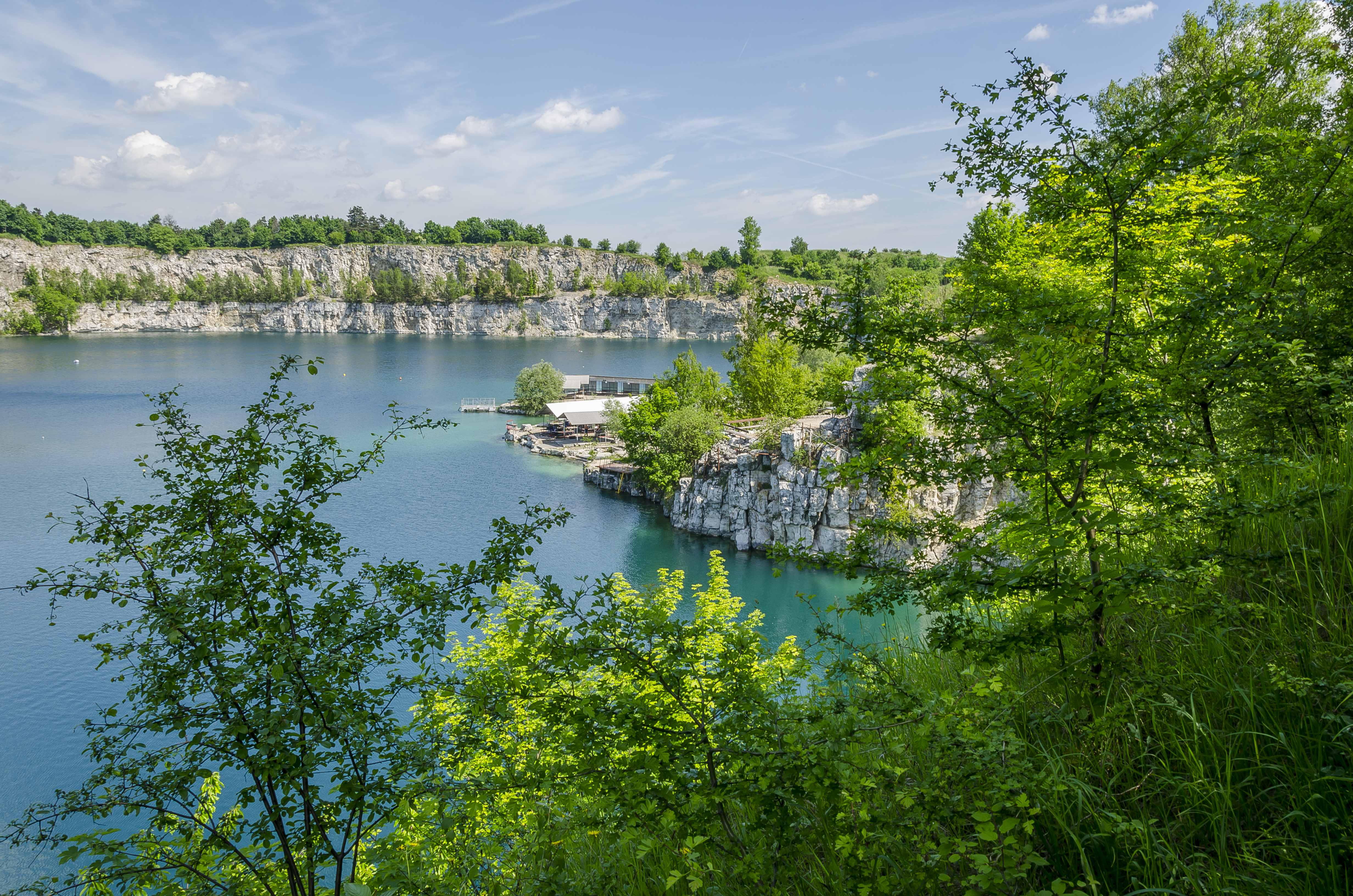 Zakrzówek, Kraków, Poland